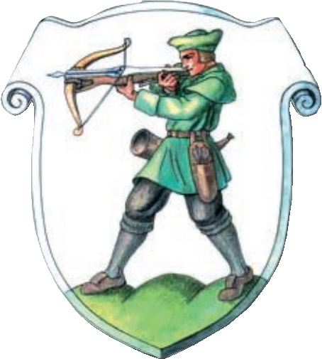 Wappen der Gemeinde Jagerberg, Steiermark